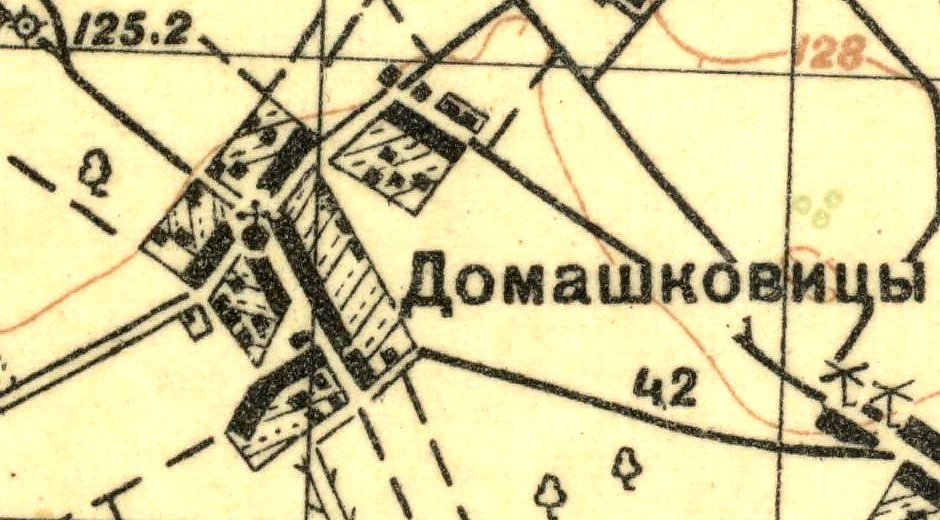 Топографическая карта Ленинградской области, квадрат О-35-23-Г (Волосово), деревня Домашковицы